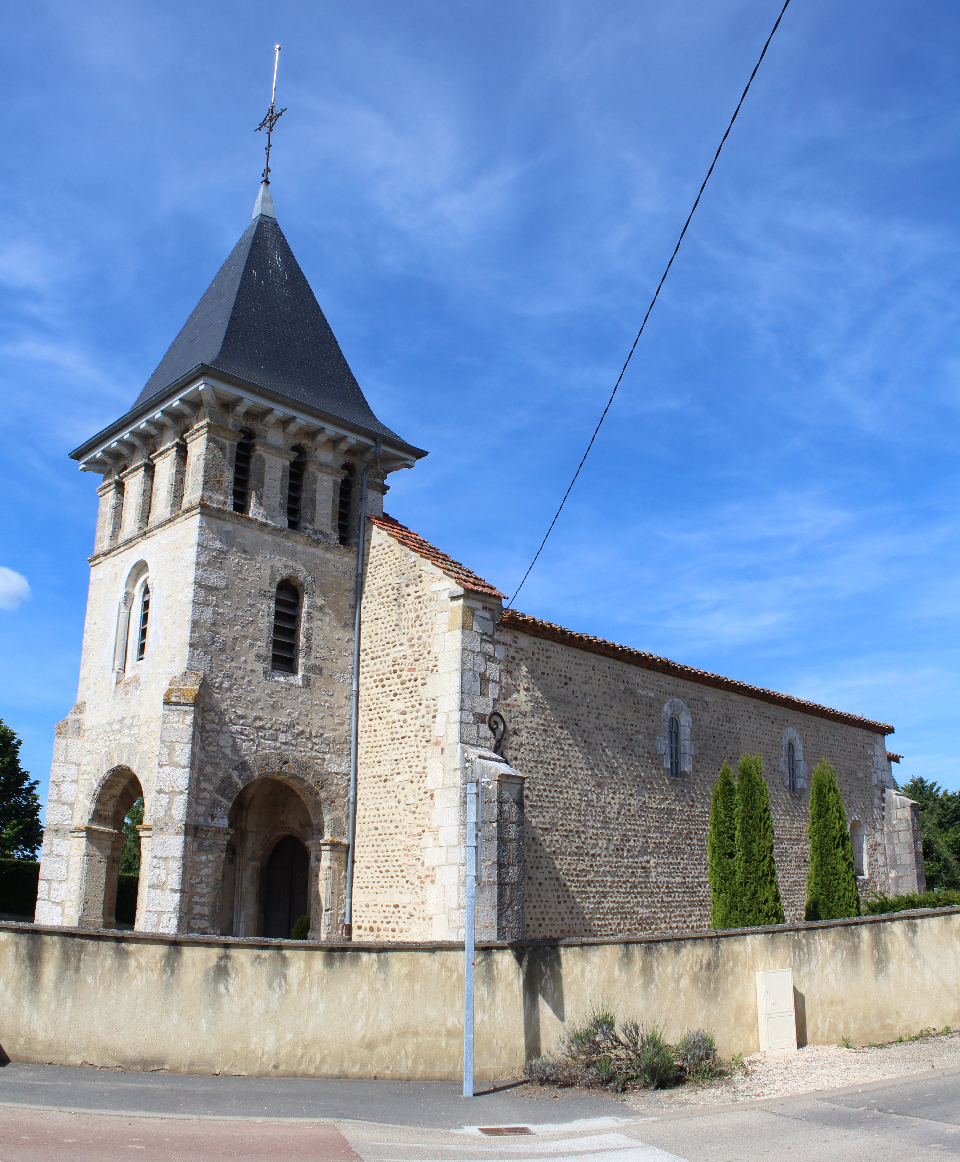 Église Saint-André de Saint-André-le-Bouchoux.